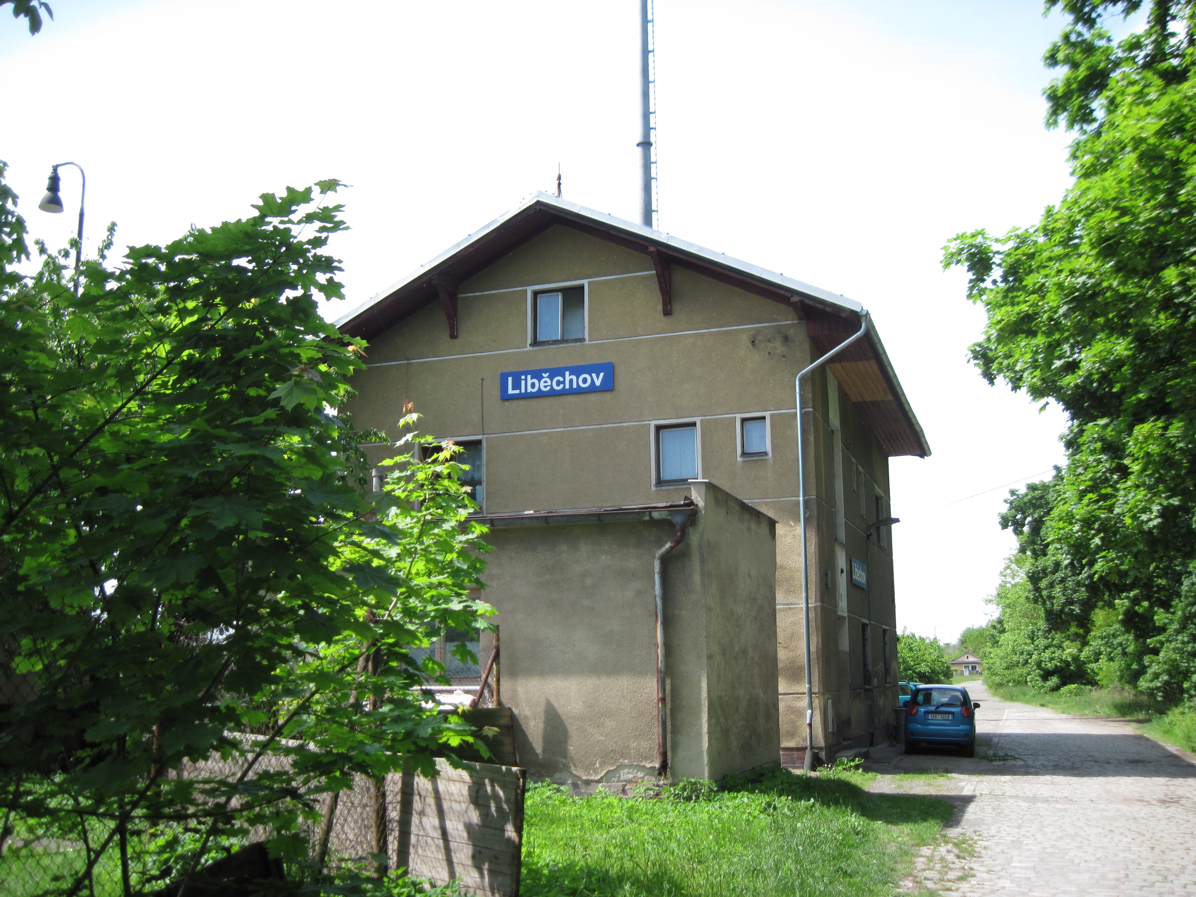 budova železniční stanice Liběchov